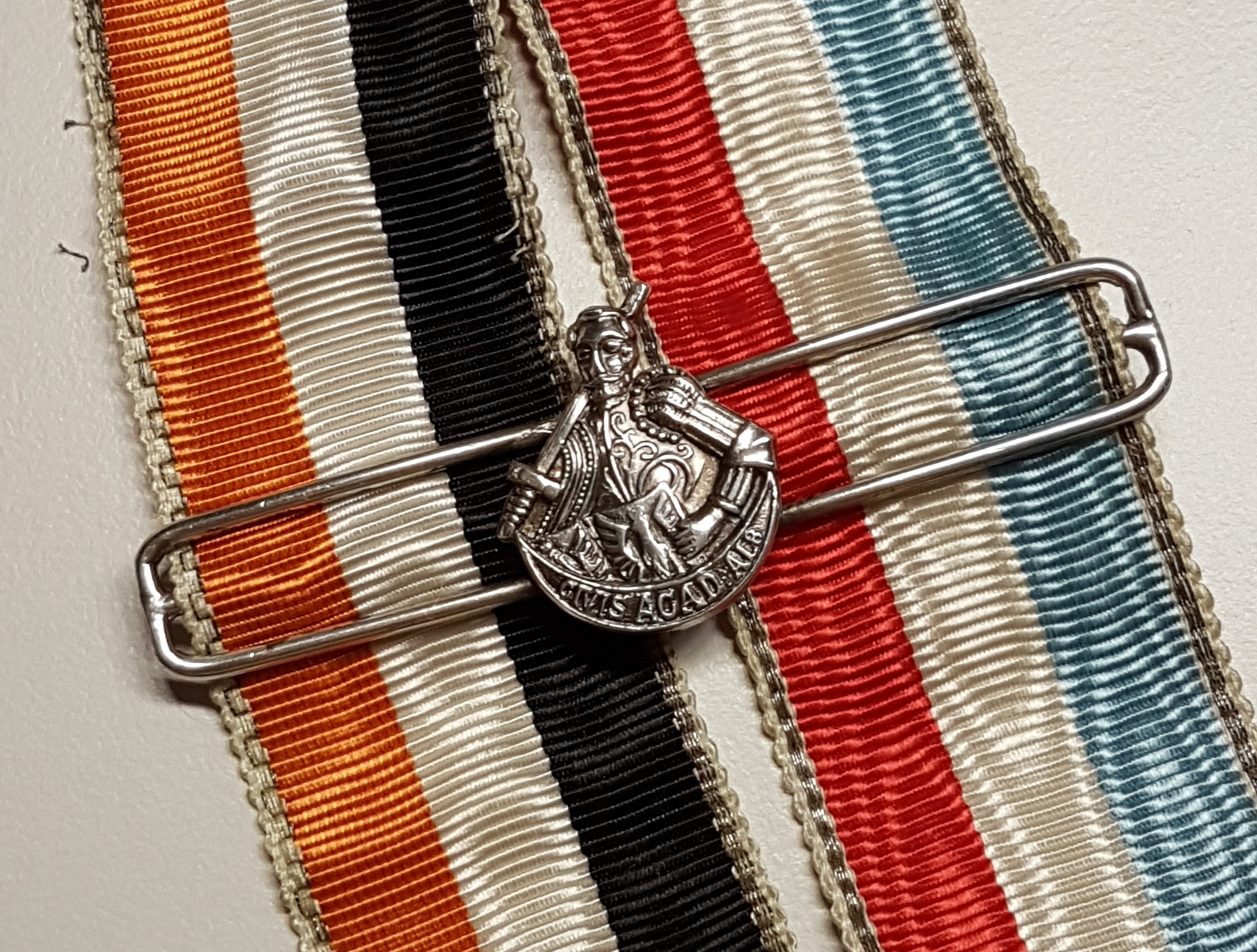 Band der "PMer" mit Albertus-Spange